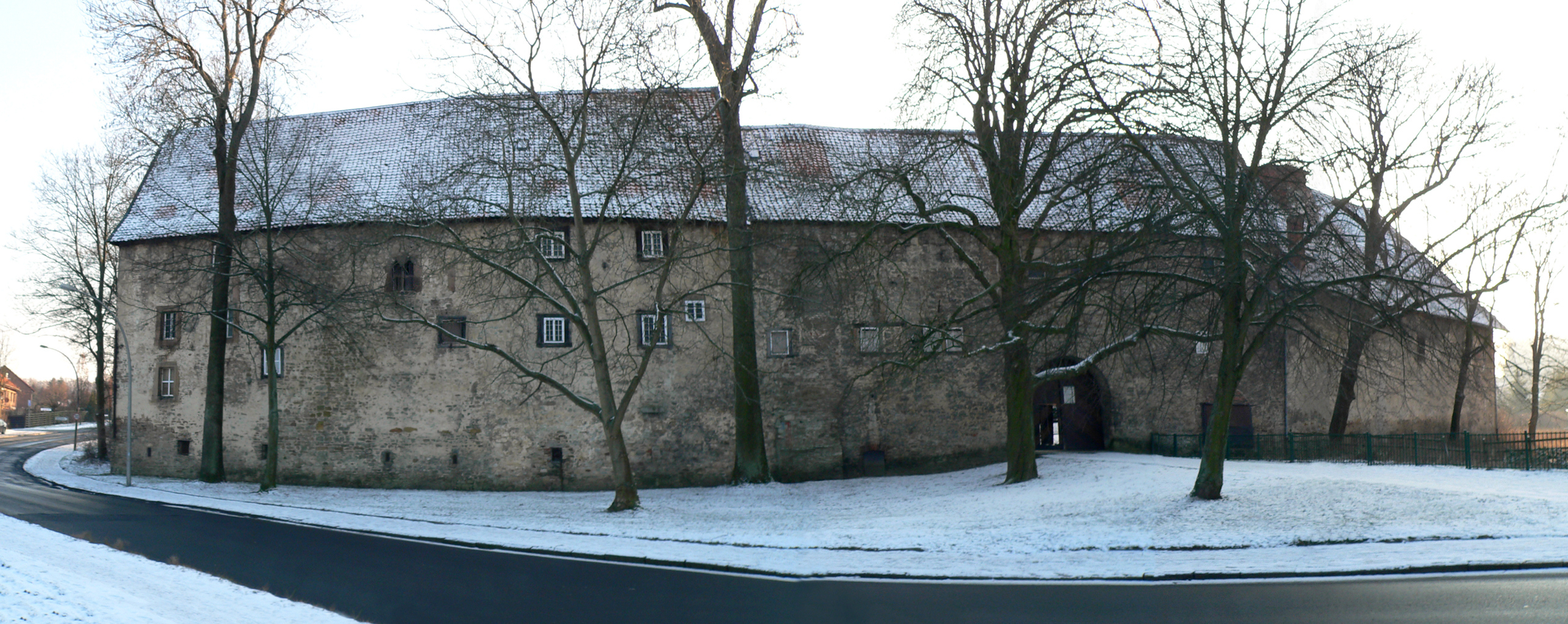 Burg Gebhardshagen Vorderseite